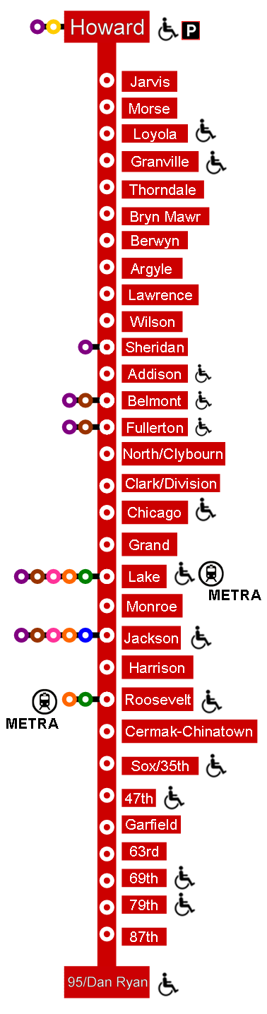 P¨lan de la ligne rouge du métro de chicago